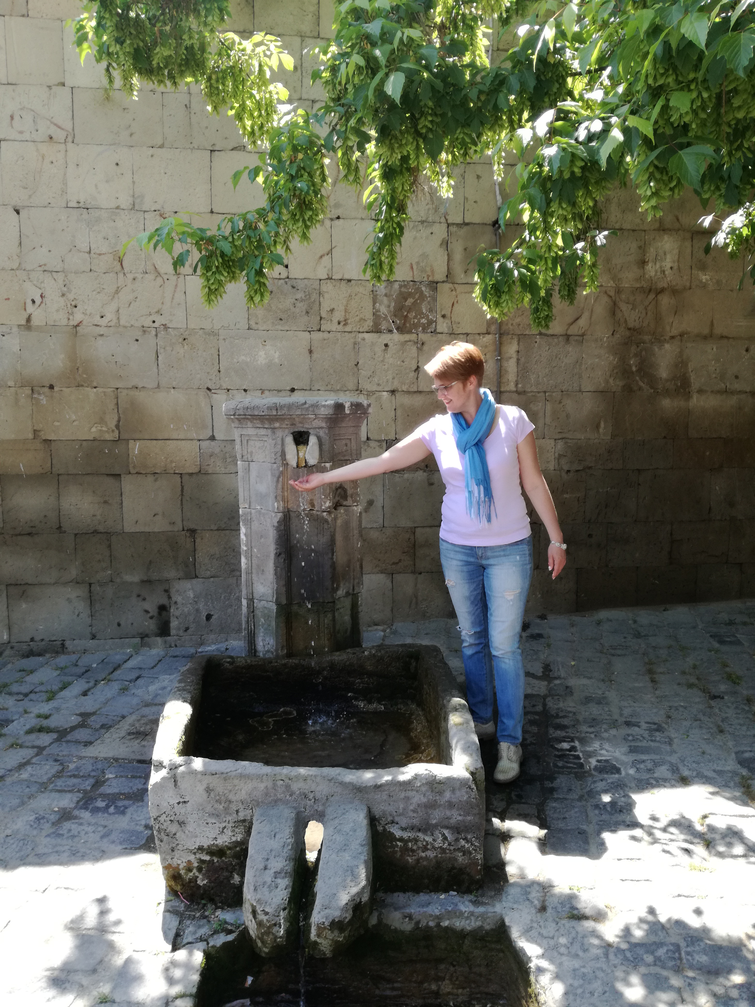 Ичери-шехер